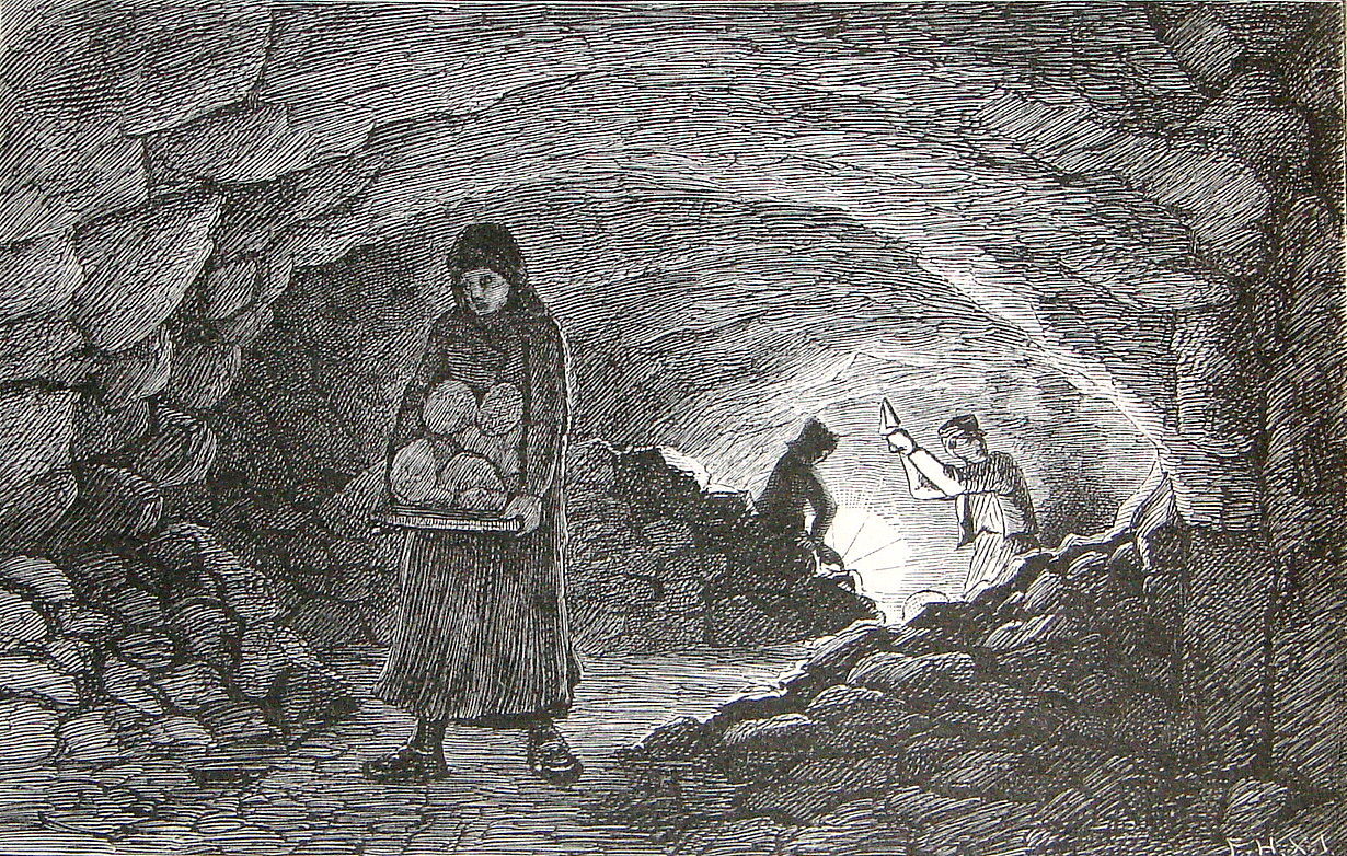 'Dansk: Kove i Daugbjerg Kalkgrube